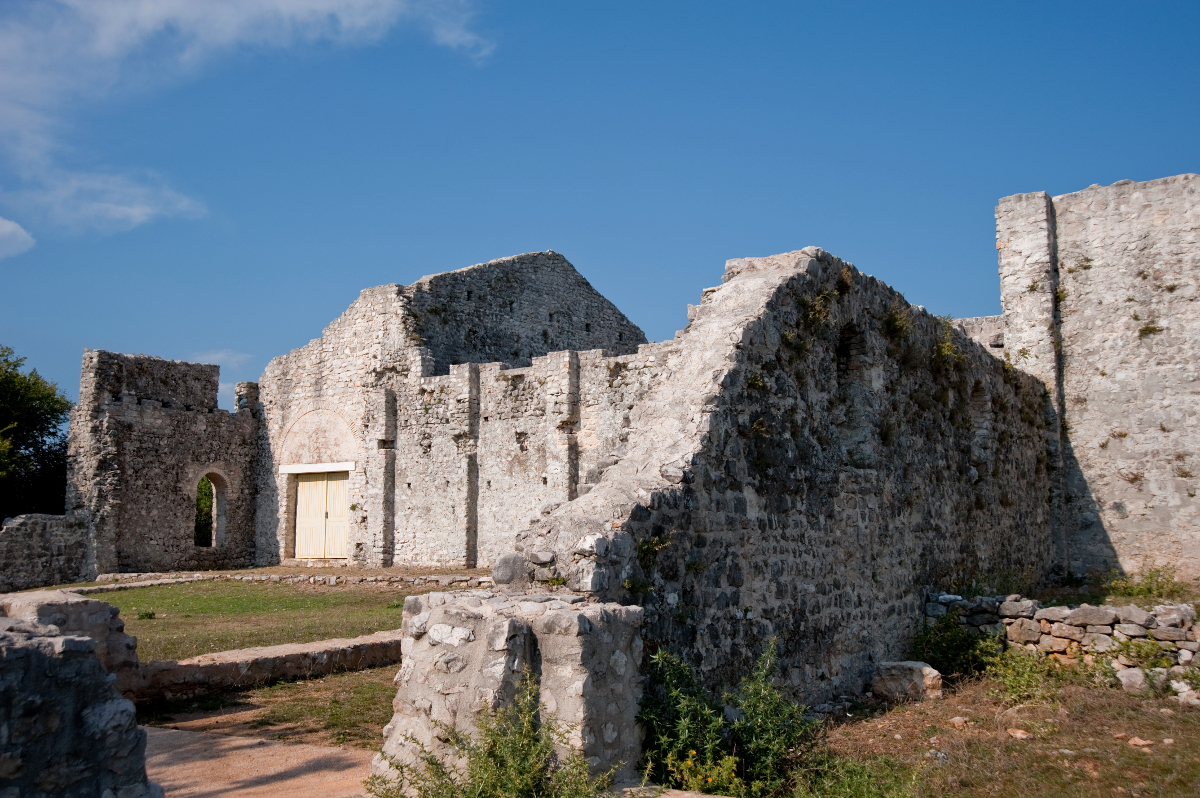 Ranokršćanski kompleks na lokalitetu Mirine u uvali Sepen blizu Omišlja